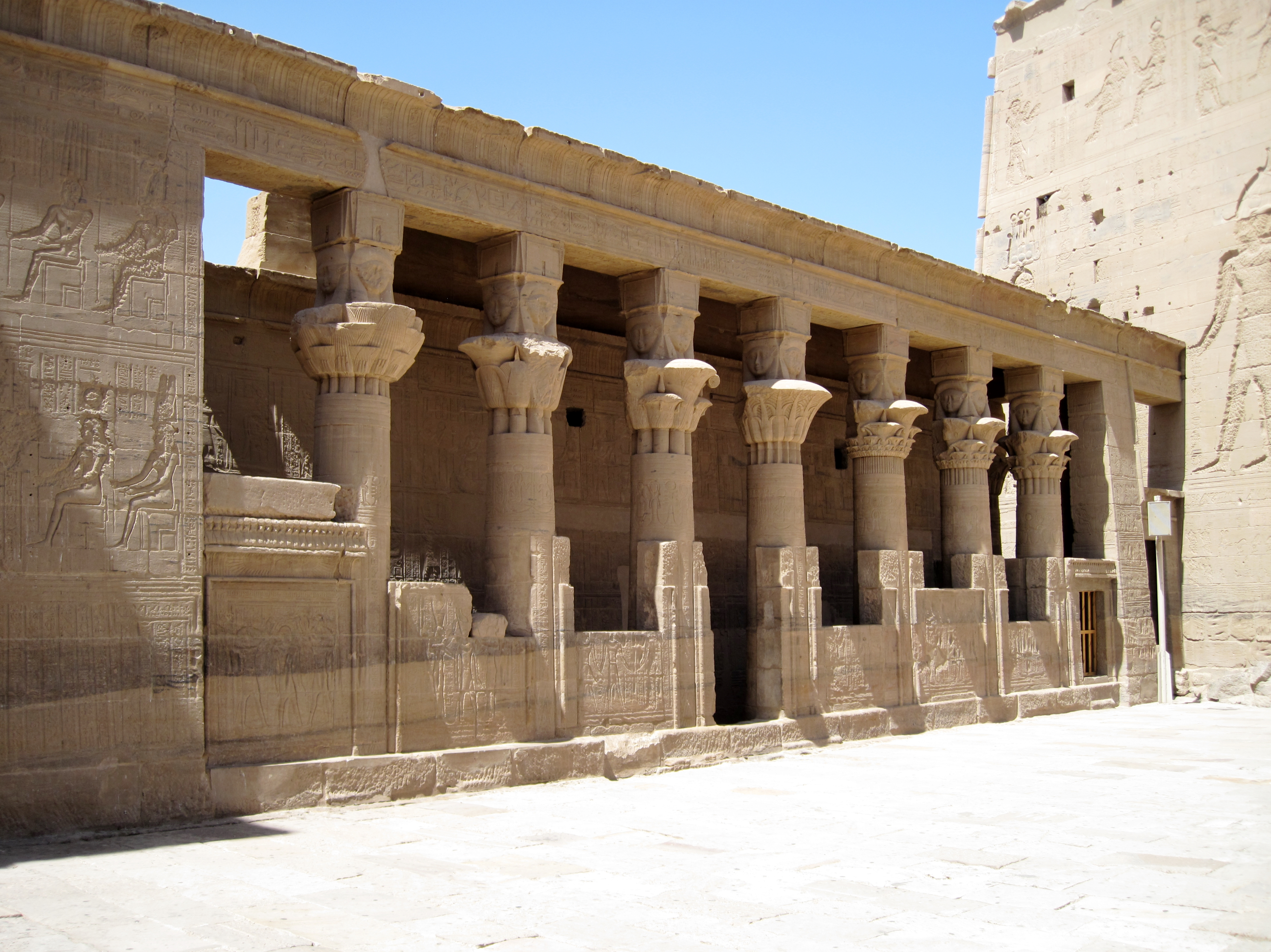 Mammisi im Hof des Isis-Tempels von Philae auf der Insel Agilkia, Ägypten